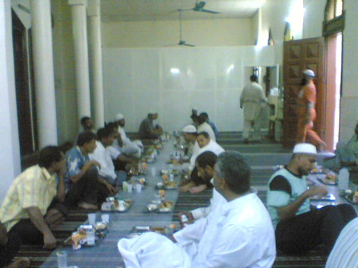 ഇഫ്താർ പാർട്ടി